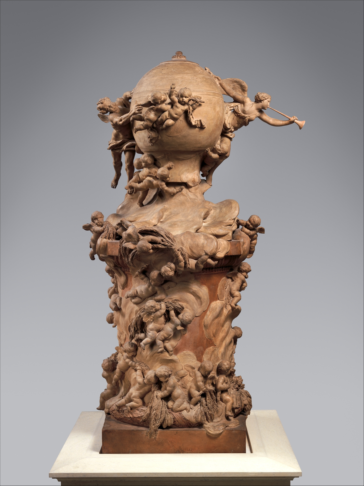 French, Paris; Model; Sculpture